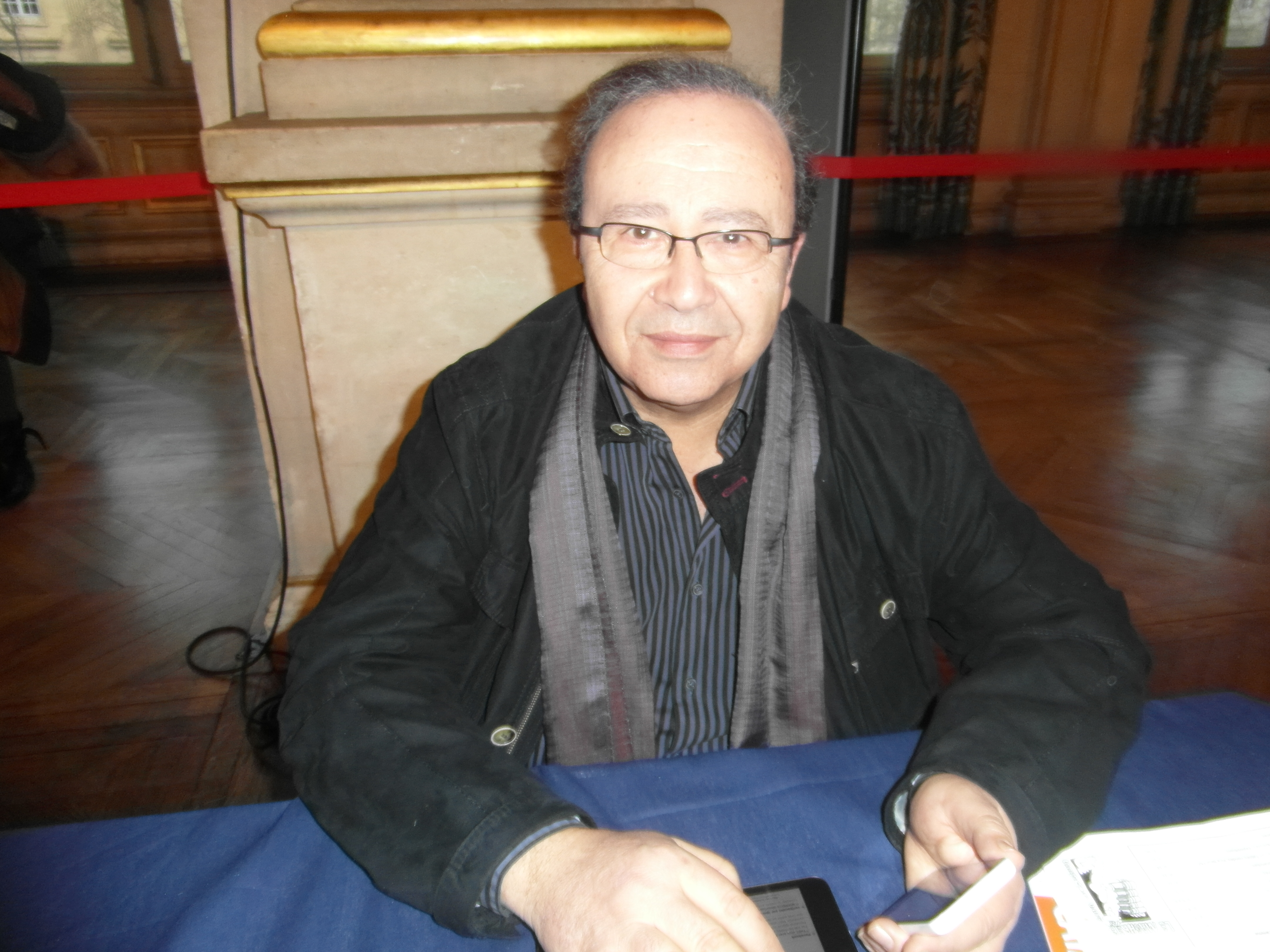 Maghreb des Livres, 7 et 8 février 2015